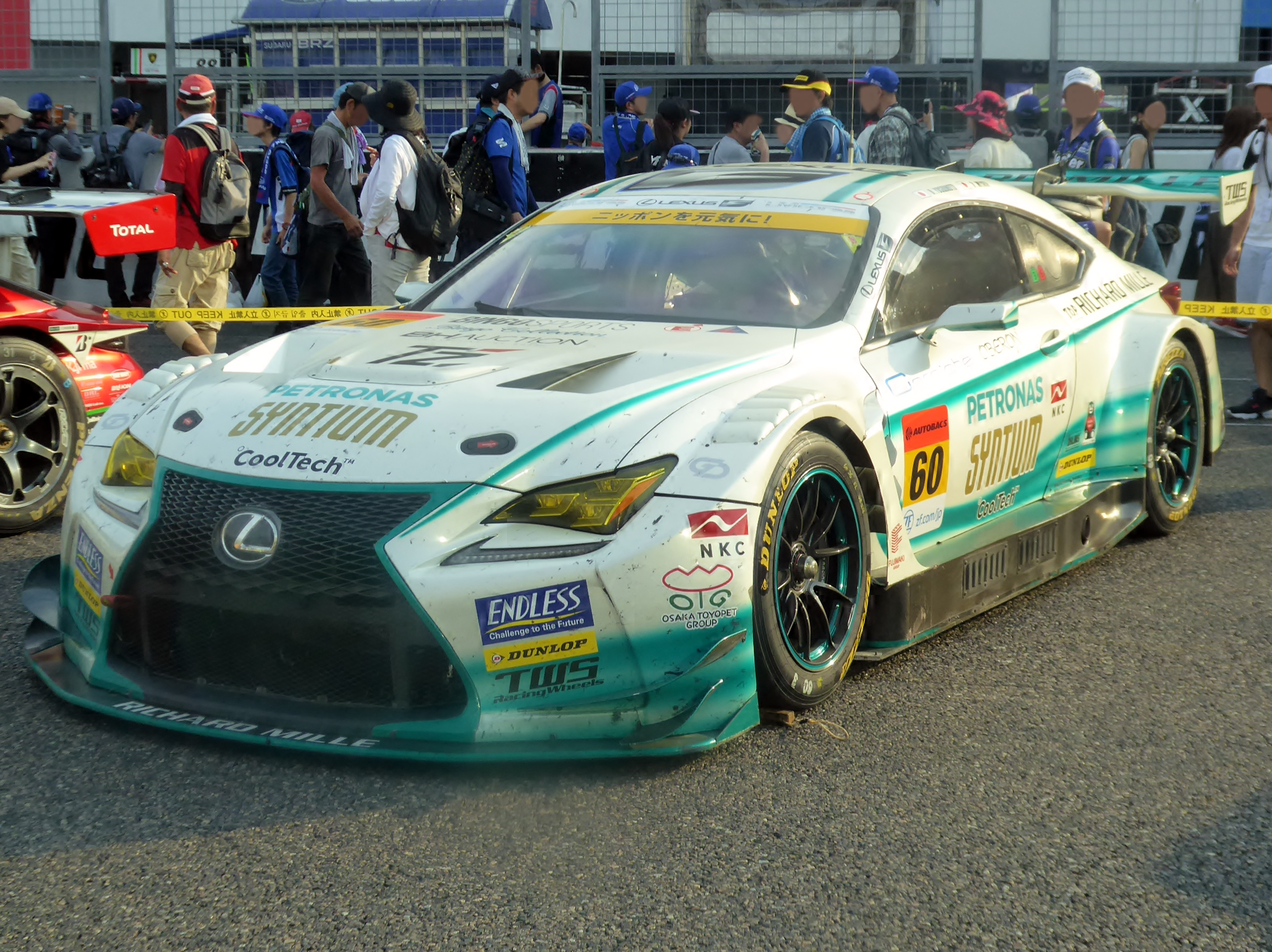 2019年鈴鹿GT300㎞終了後の60号車SYNTIUM LM corsa RC F GT3を撮影。